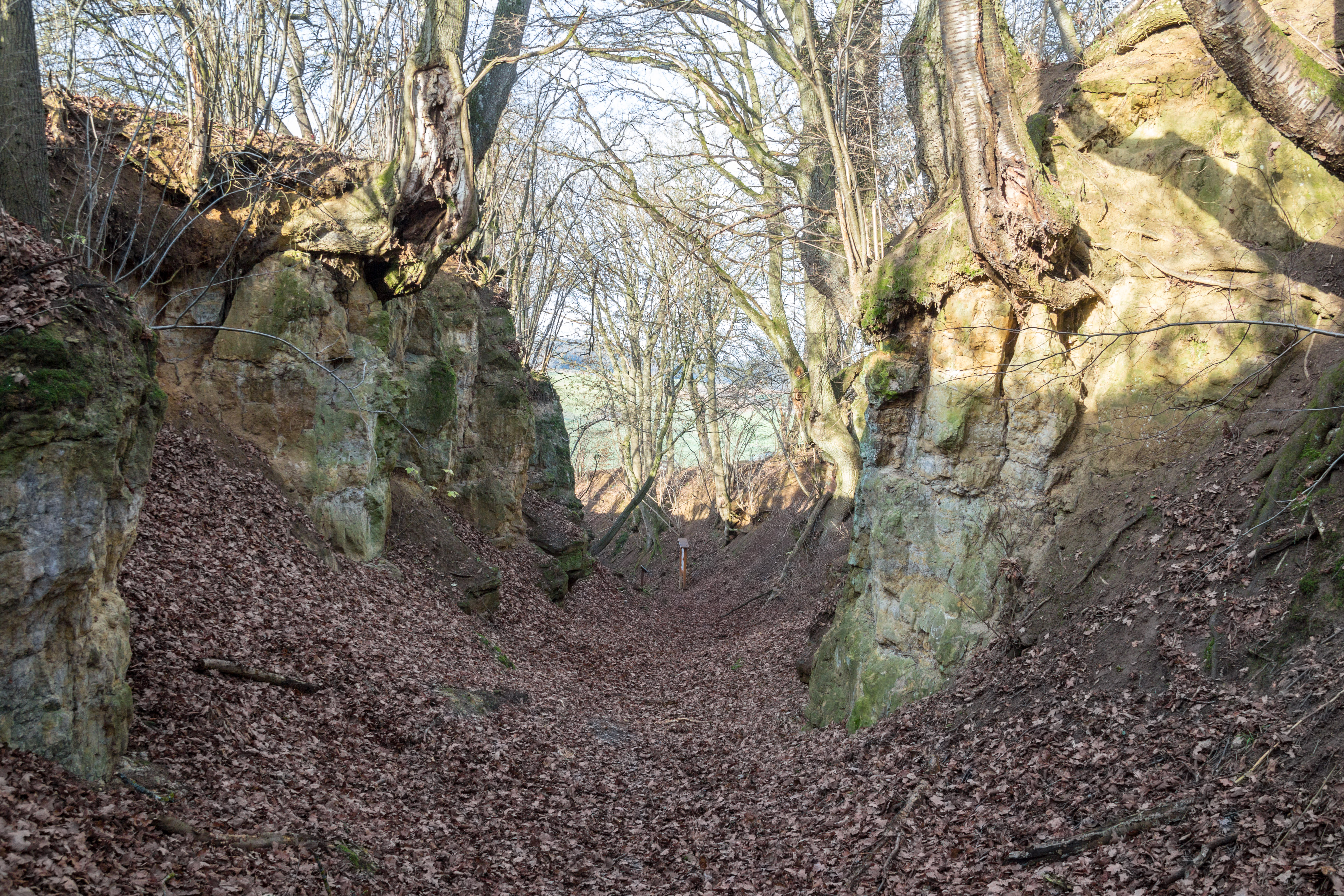 Hohlweg, Hechlingen, Heidenheim, Geotop